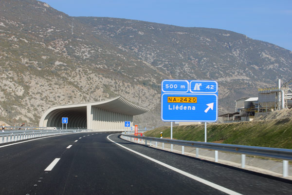 Salida de Liedena